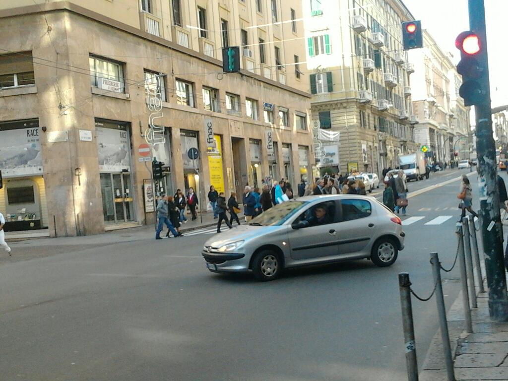 Fnac di Genova in via venti settembre